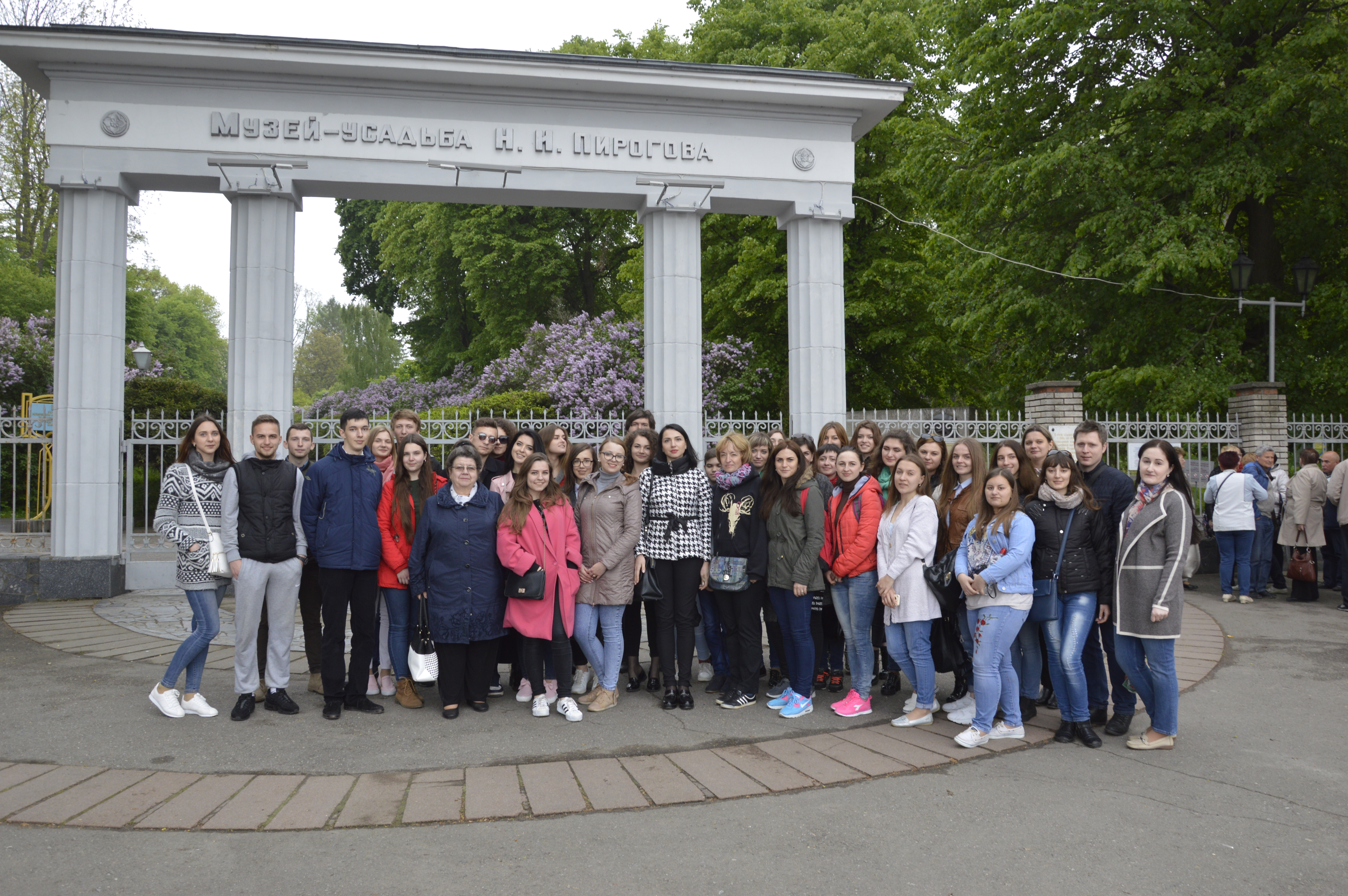 Студенти і викладачі фармацевтичного факультету ТНМУ на екскурсії у Вінниці (травень 2017 р.). У першому ряду посередині - професорка Світлана Марчишин, позаду неї серед студентів - Андрій Гуцуляк (гурт Tvorchi).